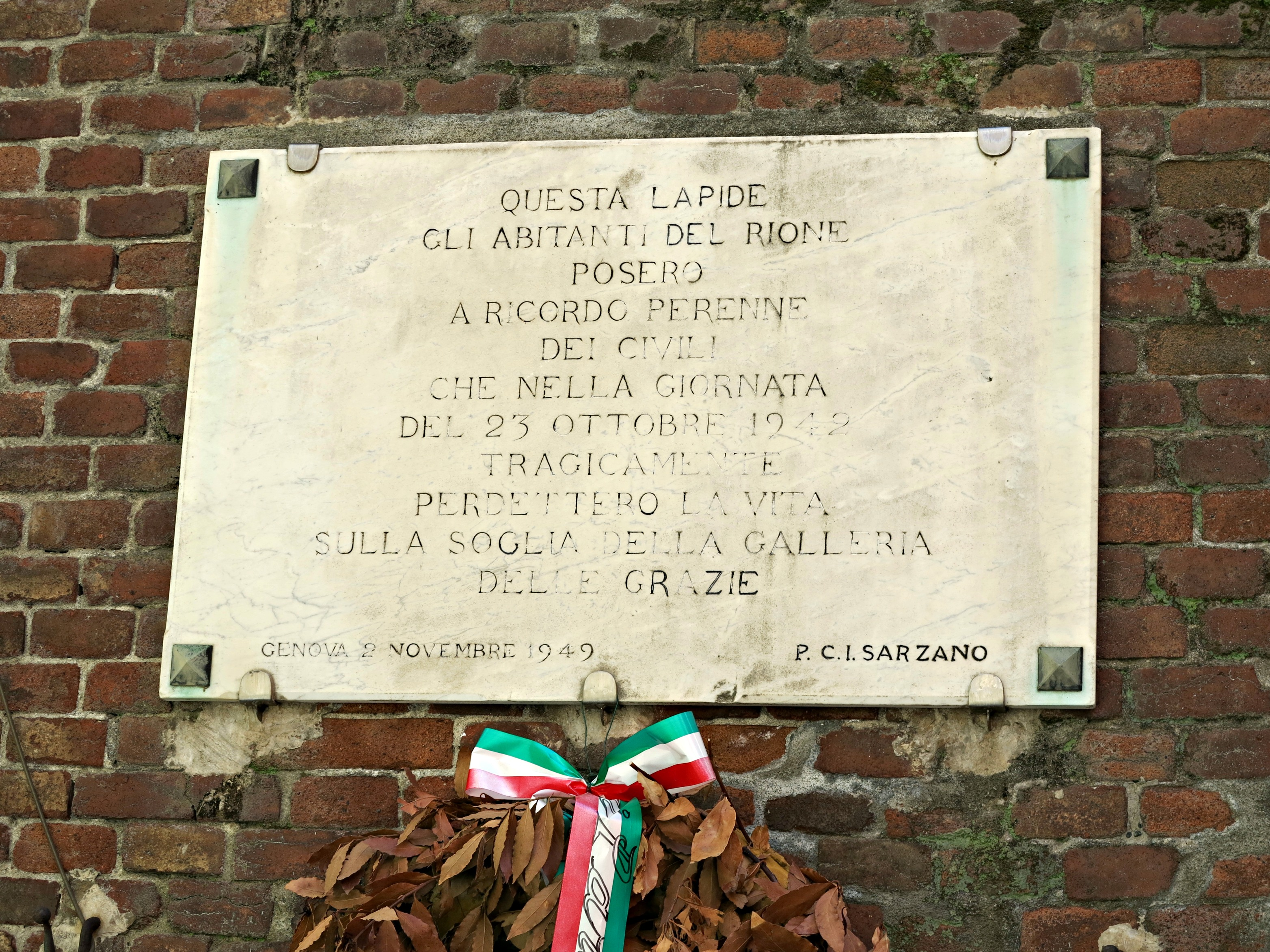 Porta Soprana This is a photo of a monument which is part of cultural heritage of Italy.